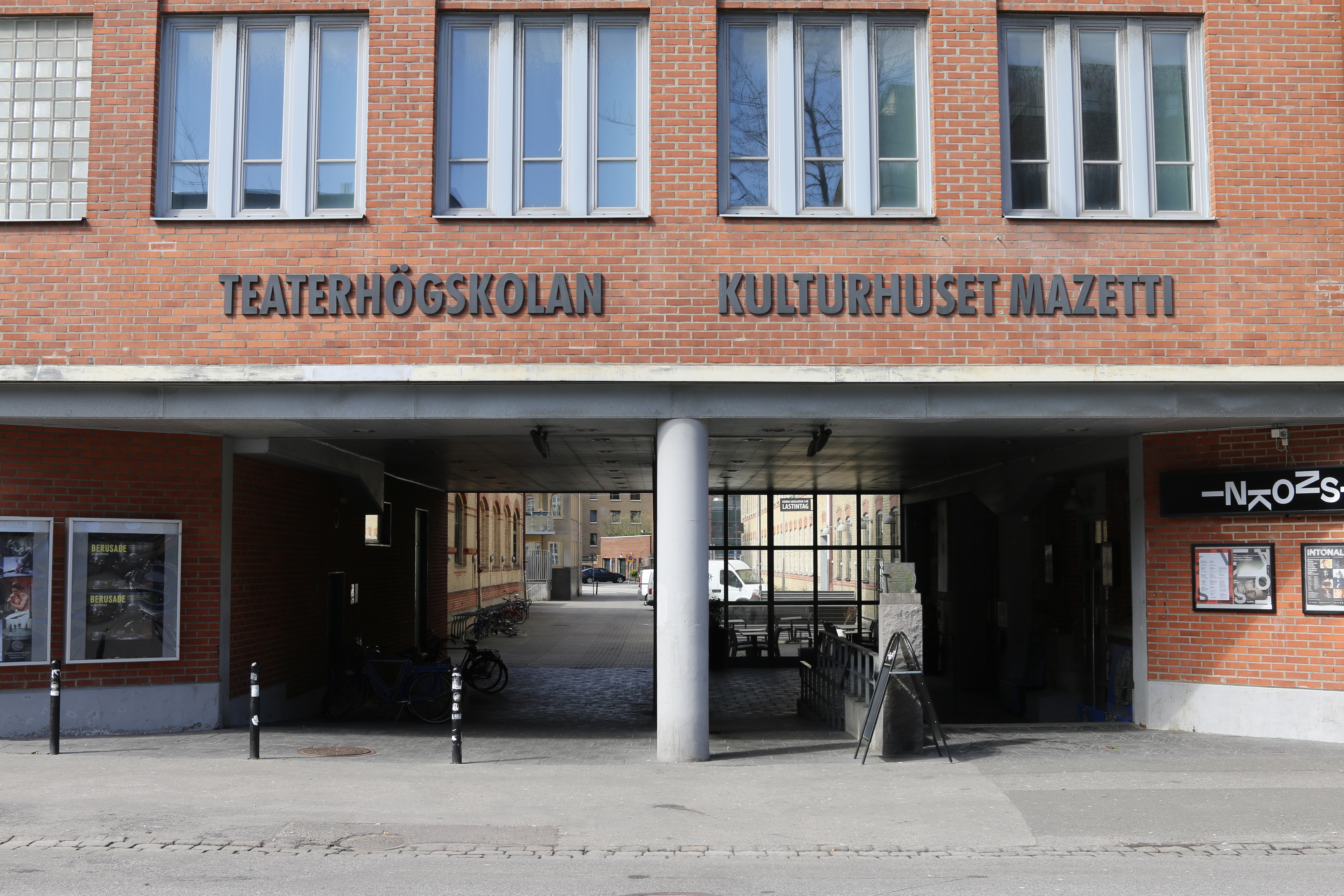 Teaterhögskolan entrance